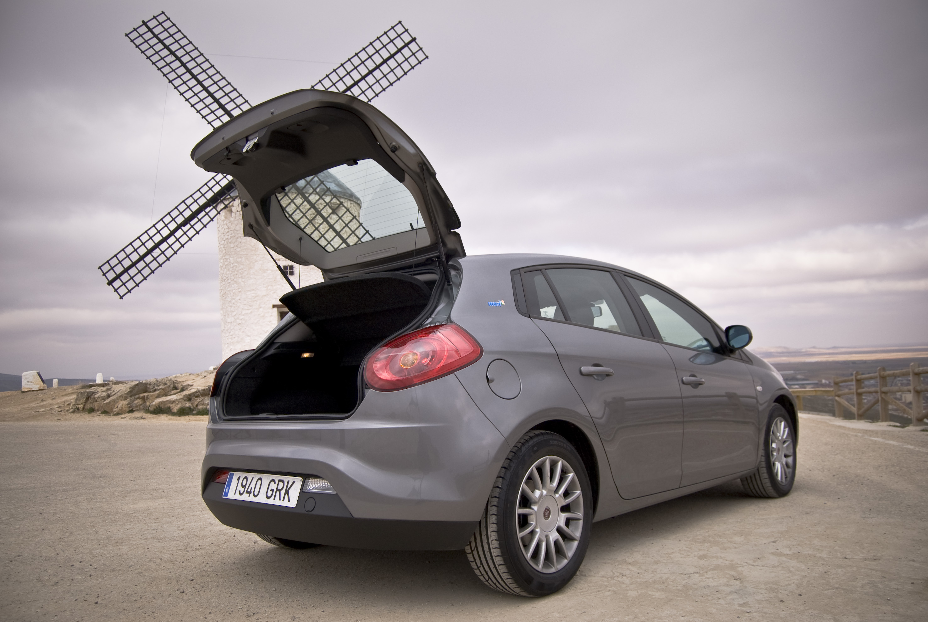 Fiat Bravo prueba y "photoshoot" en los molinos de viento de Consuegra (Toledo). Prueba en Diariomotor